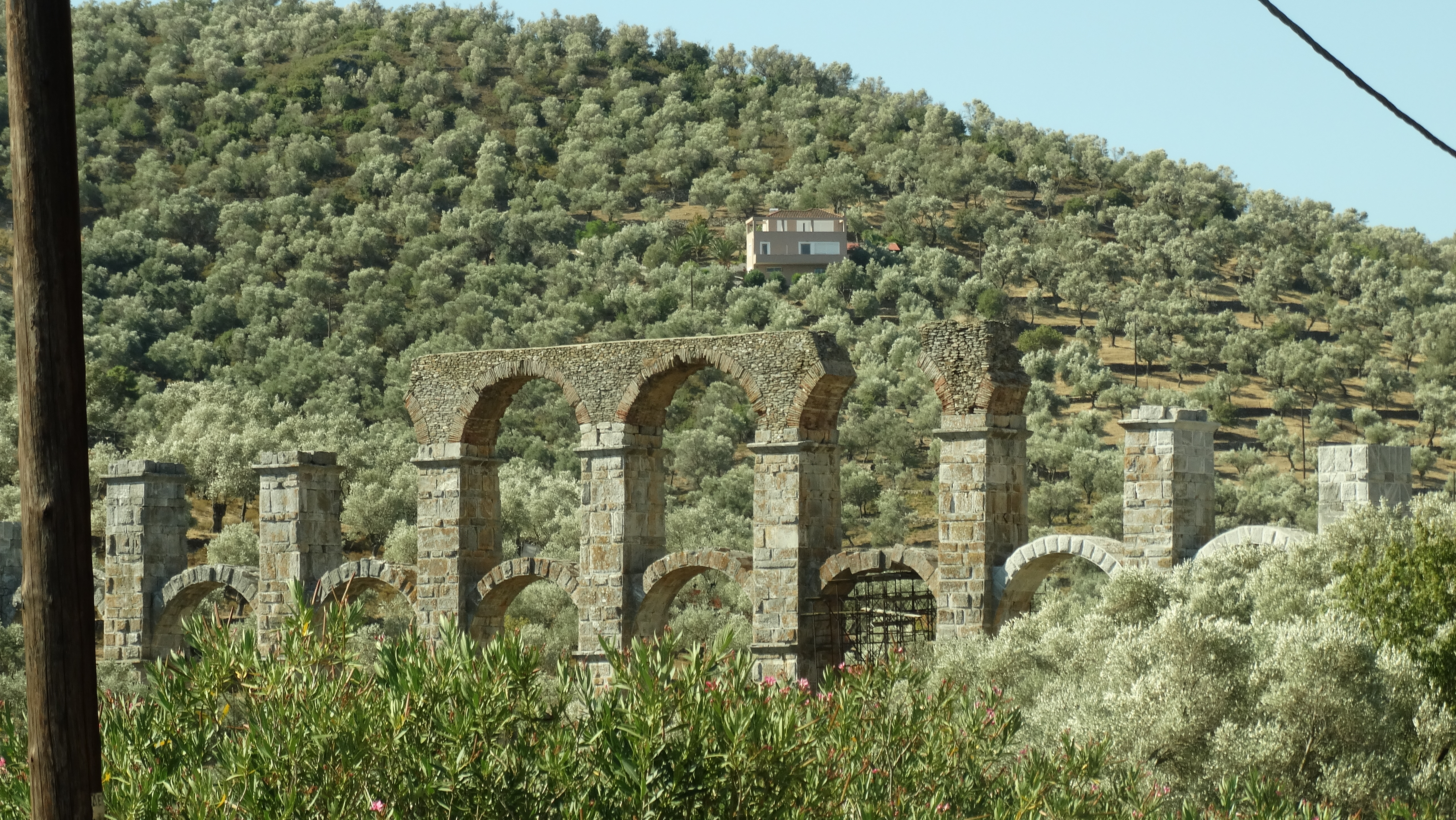 Ρωμαϊκό Υδραγωγείο Μόριας«Ρωμαϊκό Υδραγωγείο Μόριας»